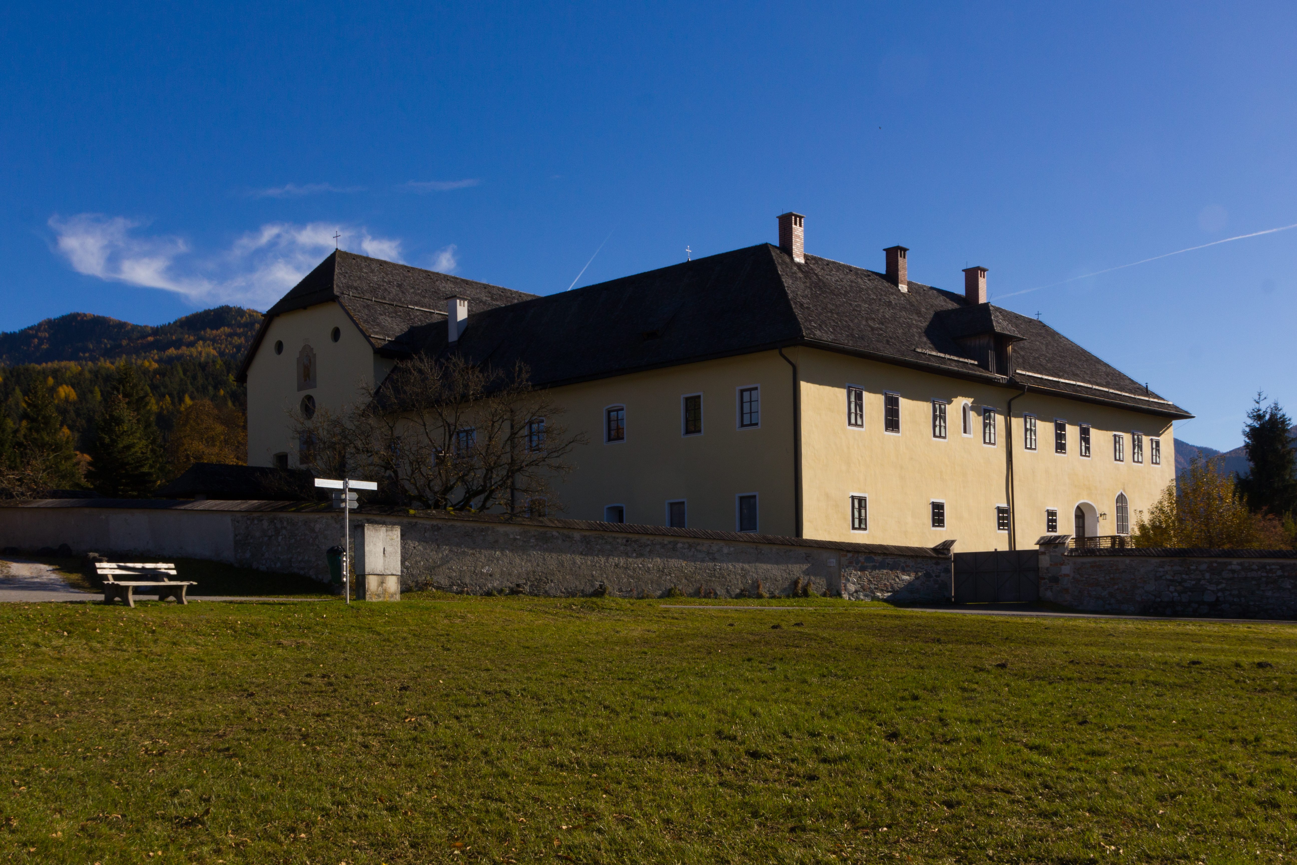 Das Gebäude des Irdninger Kapuzinerklosters 2015